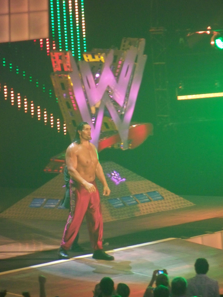 الربع الخالي في اظهار ووي.